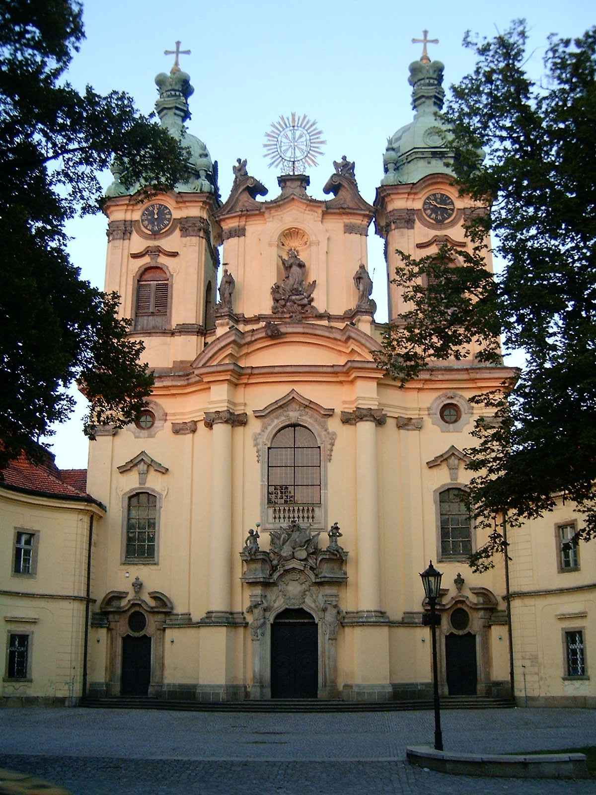 Legnickie Pole - barokowy kościół pw św. Jadwigi z dawnym klasztorem Benedyktynów